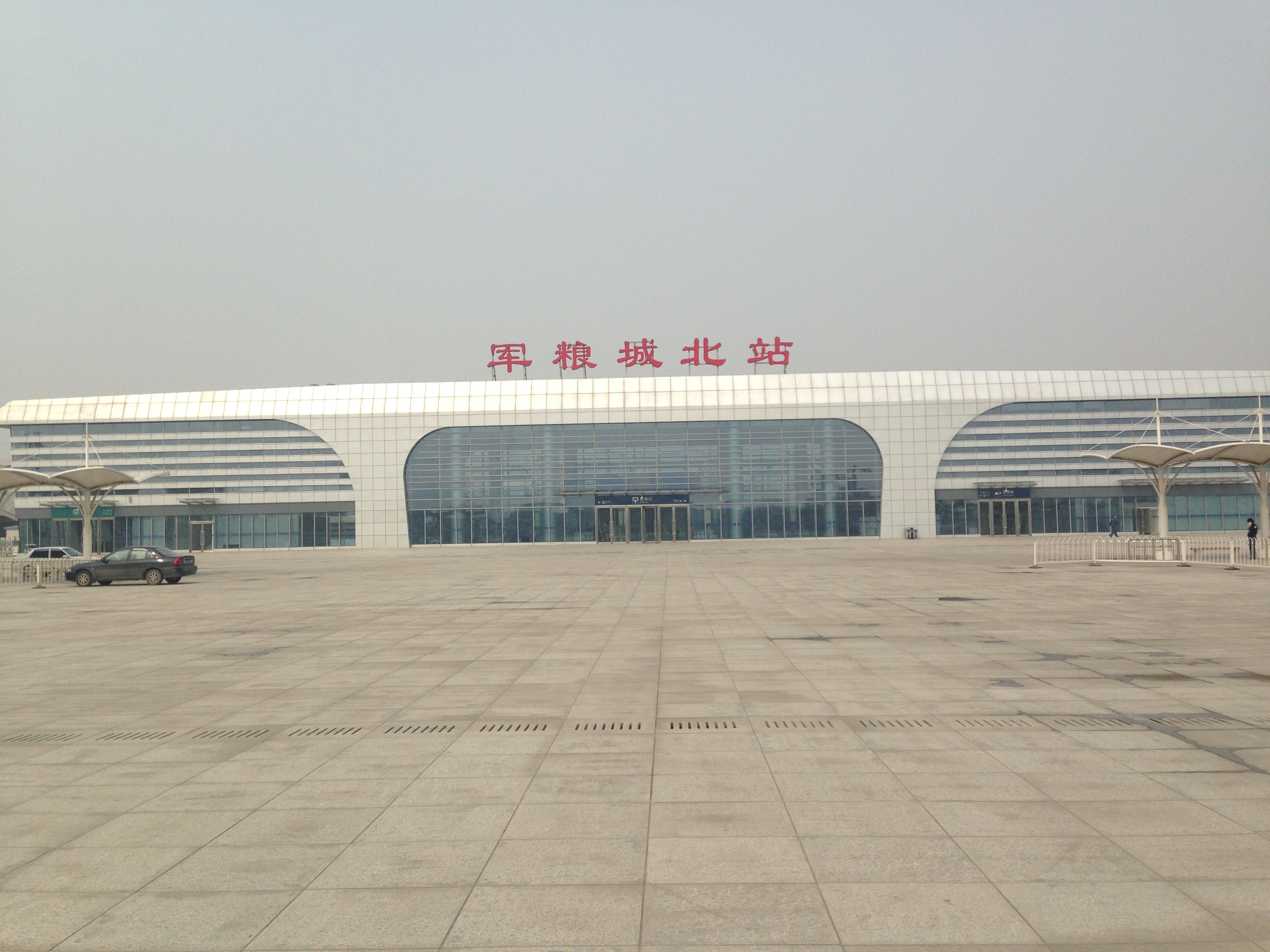 军粮城北站